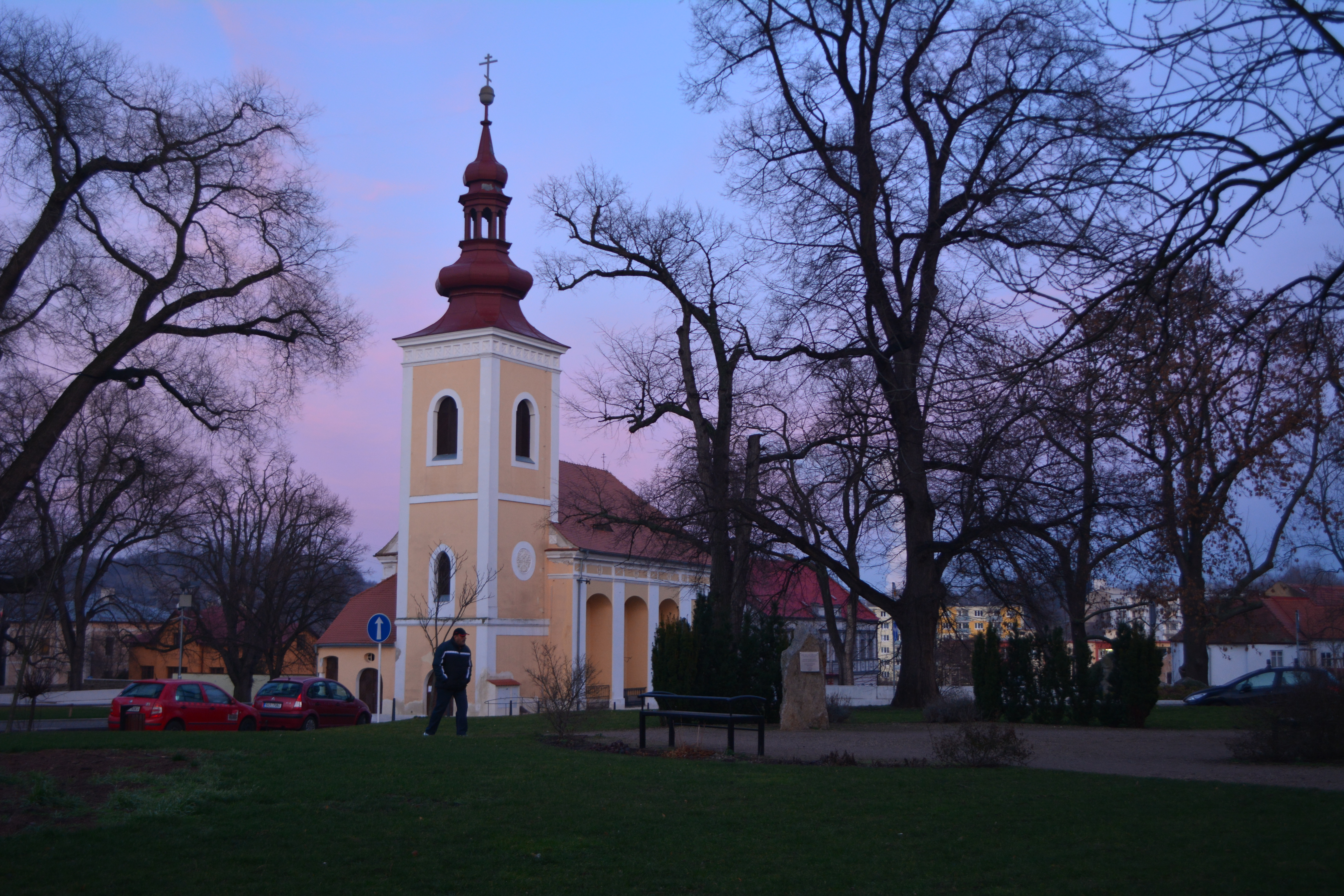 Pohled na kostel svaté Anny a pomník věnovaný J.W. Löschnerovi